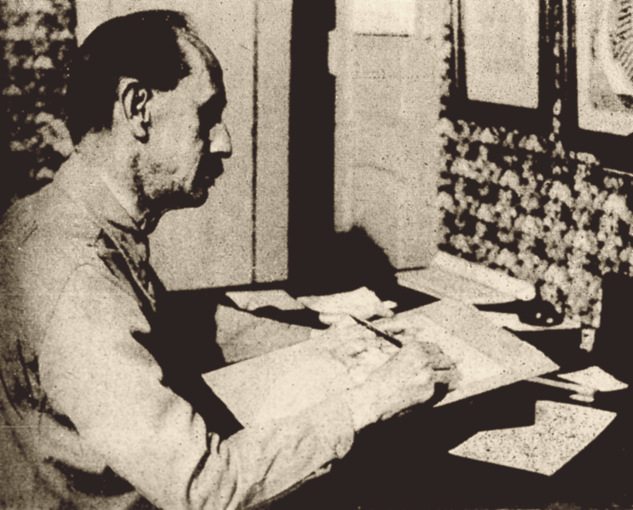 O ilustrador e editor brasileiro, Raul Pederneiras em 1944.